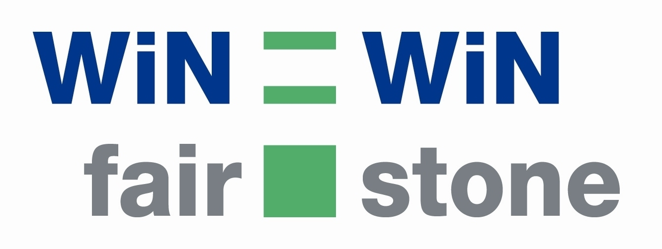 Muster Fair Stone Logo